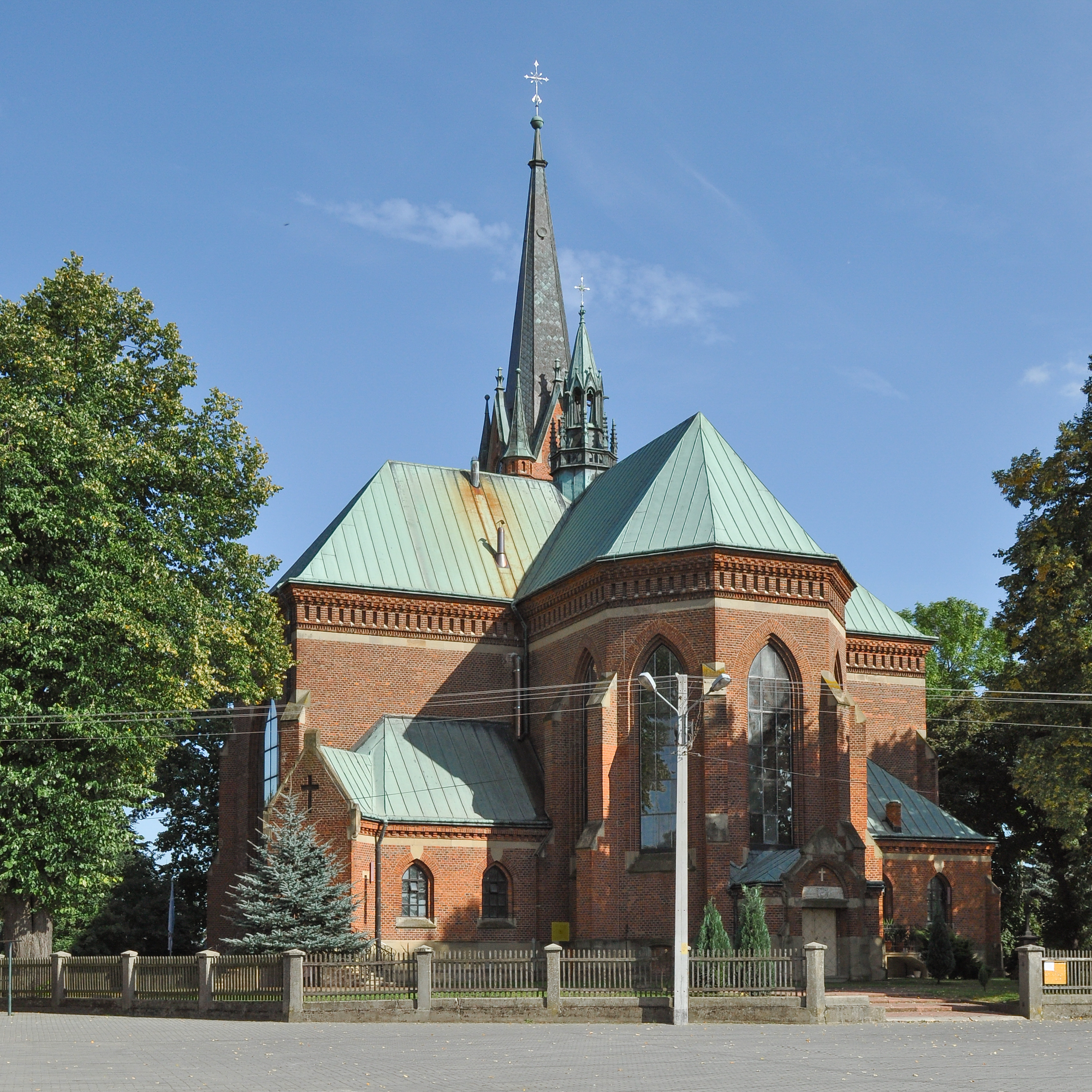 Kościół Wszystkich świętych w Chorzelowie